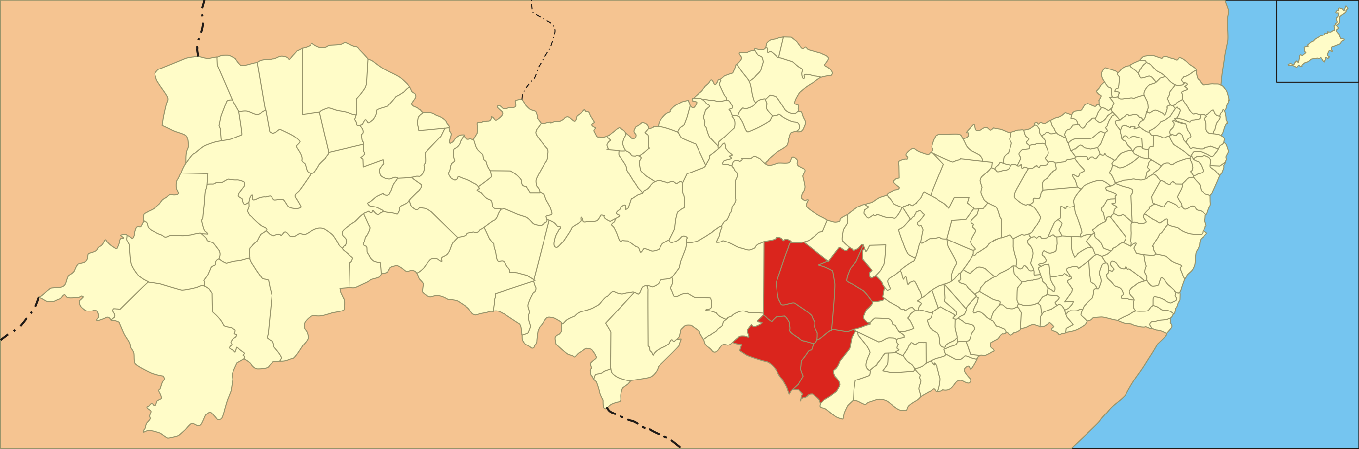 Localização da microrregião no estado de Pernambuco.